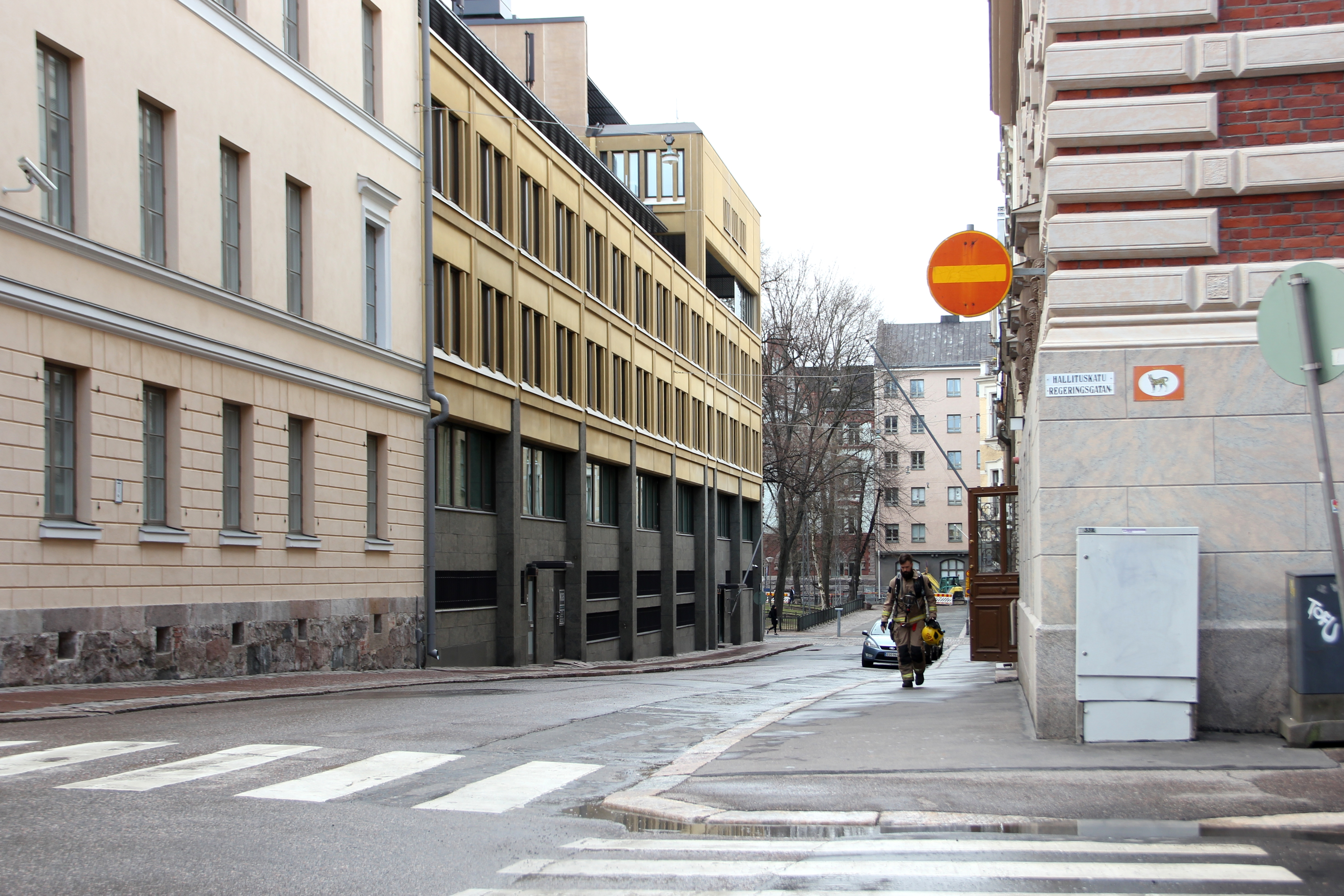 Näkymä Hallituskadun kulmasata Ritarikadulle Rauhankadun suuntaan. Palomies on juuri astunut sivuovesta ulos väärän hälytyksen jälkeen.